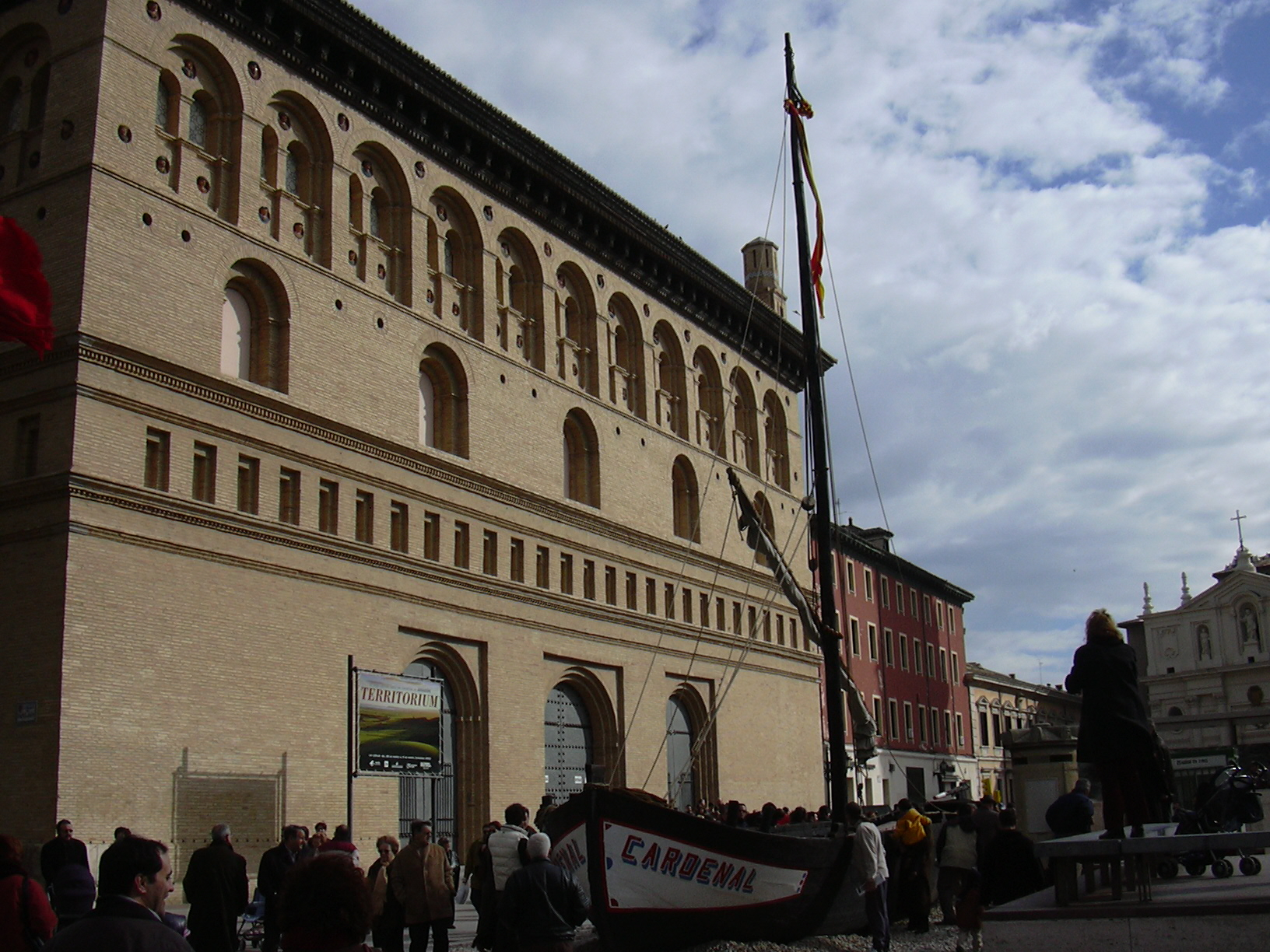 Aragonés: Llagut lo Cardenal en Zaragoza en 2003